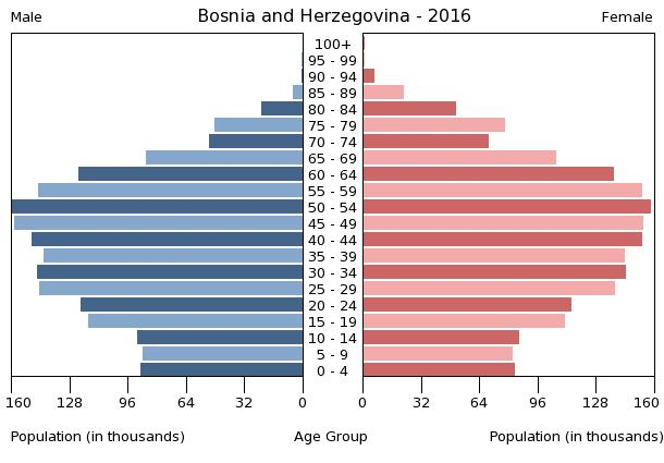 A population pyramid illustrates the age and sex structure of a country's population and may provide insights about political and social stability, as well as economic development. The population is distributed along the horizontal axis, with males shown on the left and females on the right. The male and female populations are broken down into 5-year age groups represented as horizontal bars along the vertical axis, with the youngest age groups at the bottom and the oldest at the top. The shape of the population pyramid gradually evolves over time based on fertility, mortality, and international migration trends.